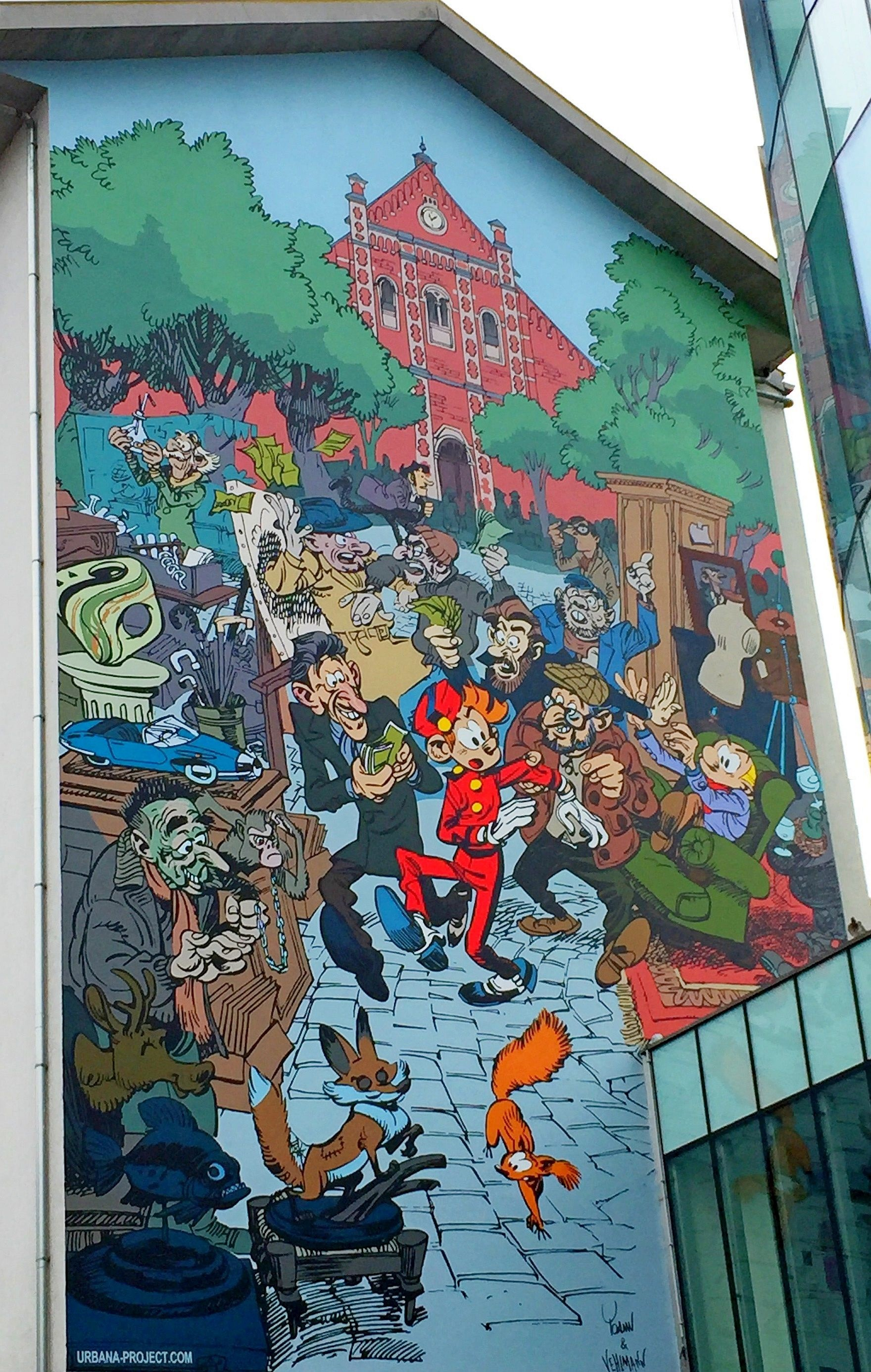 Mural del cómic Spirou en la fachada de una casa de Bruselas (Bélgica).